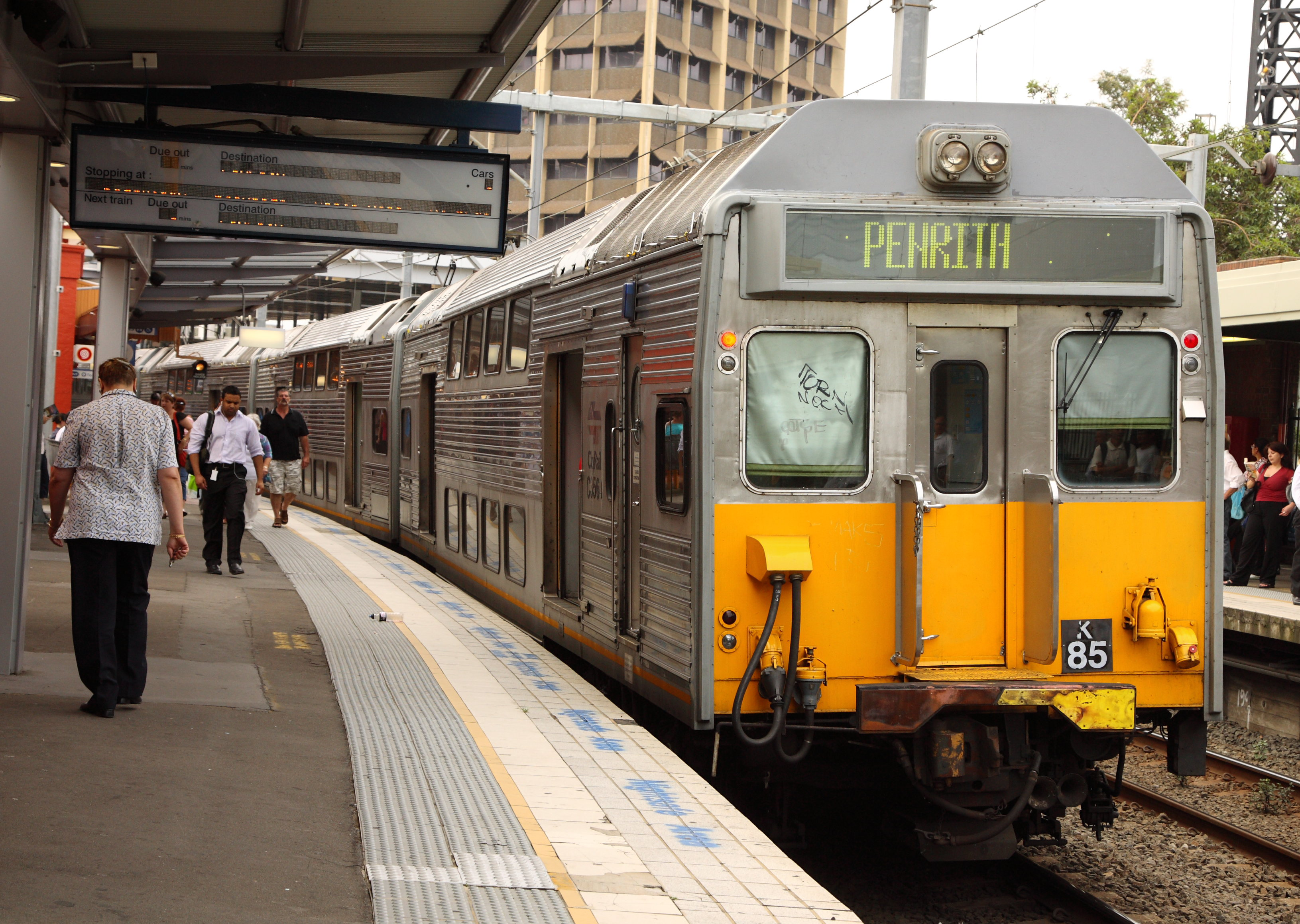 K set 85 at Parramatta station.